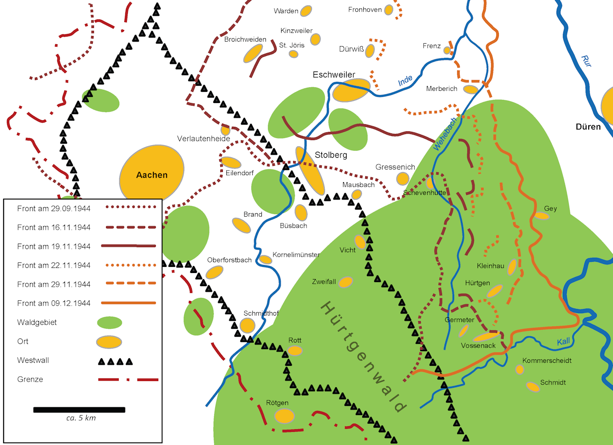 Karte der Operationen im Hürtgenwald 1944